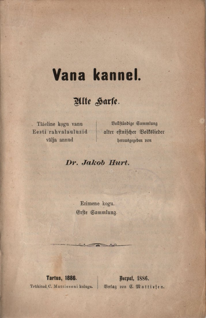 Vana kannel. Alte Harfe.